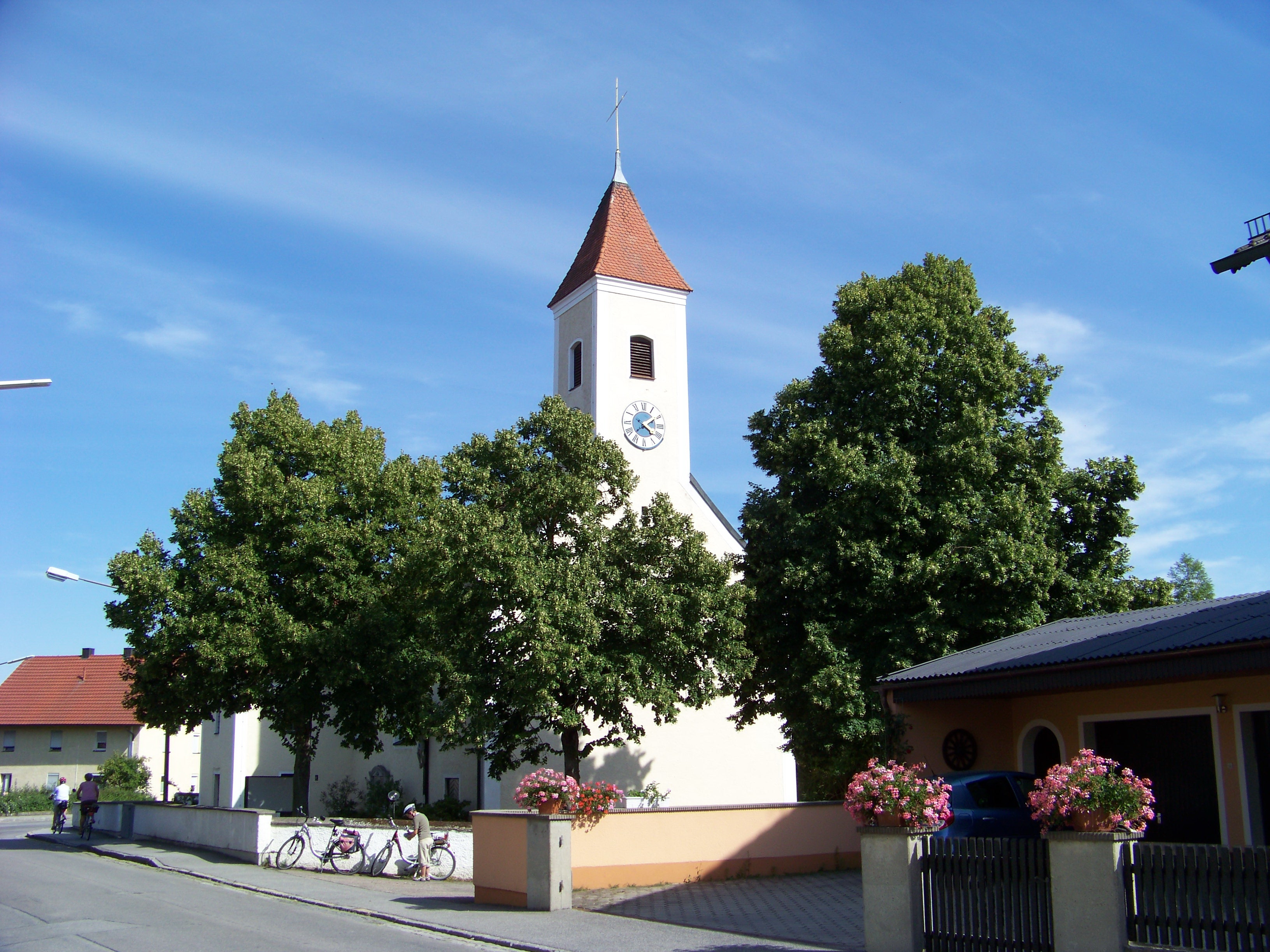 Obertraubling, Gebelkofen, Obere Dorfstraße 1. Kath. Filialkirche St. Johannes Baptist. Saalbau mit eingezogenem Chor, zweigeschossiger Sakristei mit Walmdach und Giebelturm, 1792 unter Erhöhung des im Kern romanischen Turms; mit Ausstattung; Friedhofsmauer, 18./19. Jahrhundert, mit eingelassenen Grabsteinen